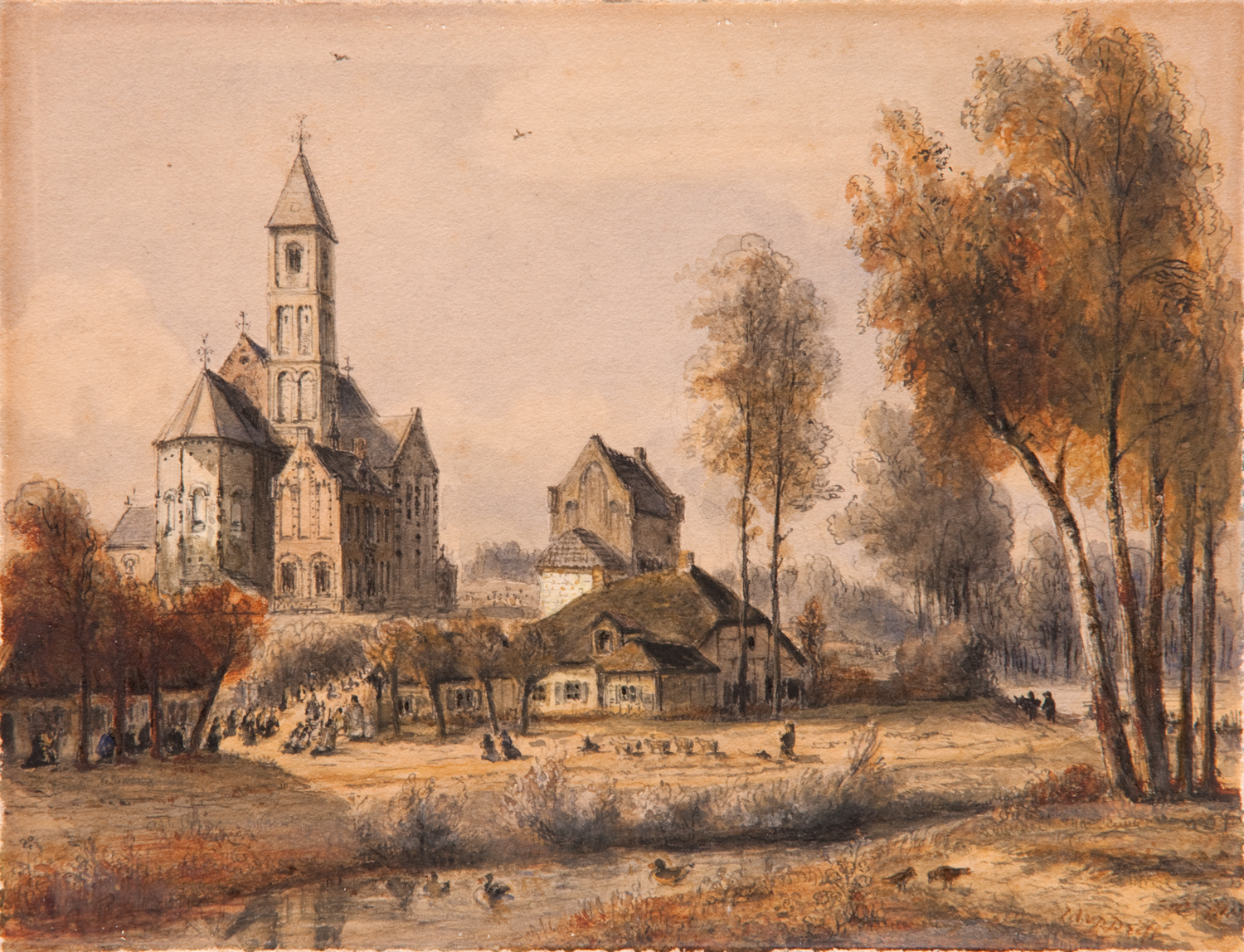 Rooms-Katholieke Kerk: reproductie van tekening in bezit van Gemeente Museum Roermond